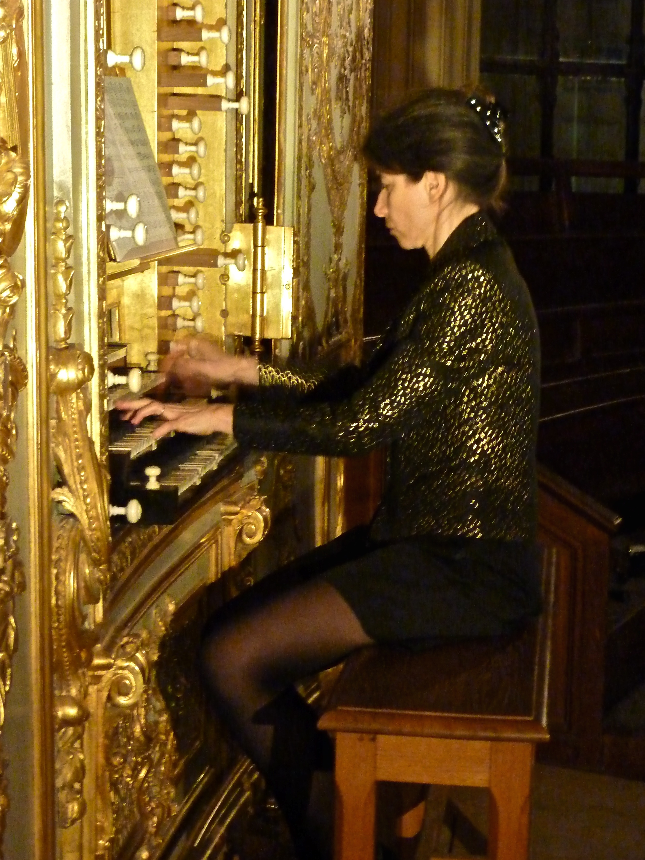 Marina Tchebourkina, à l’orgue de la Chapelle Royale de Versailles (photo Franck Bénéï)